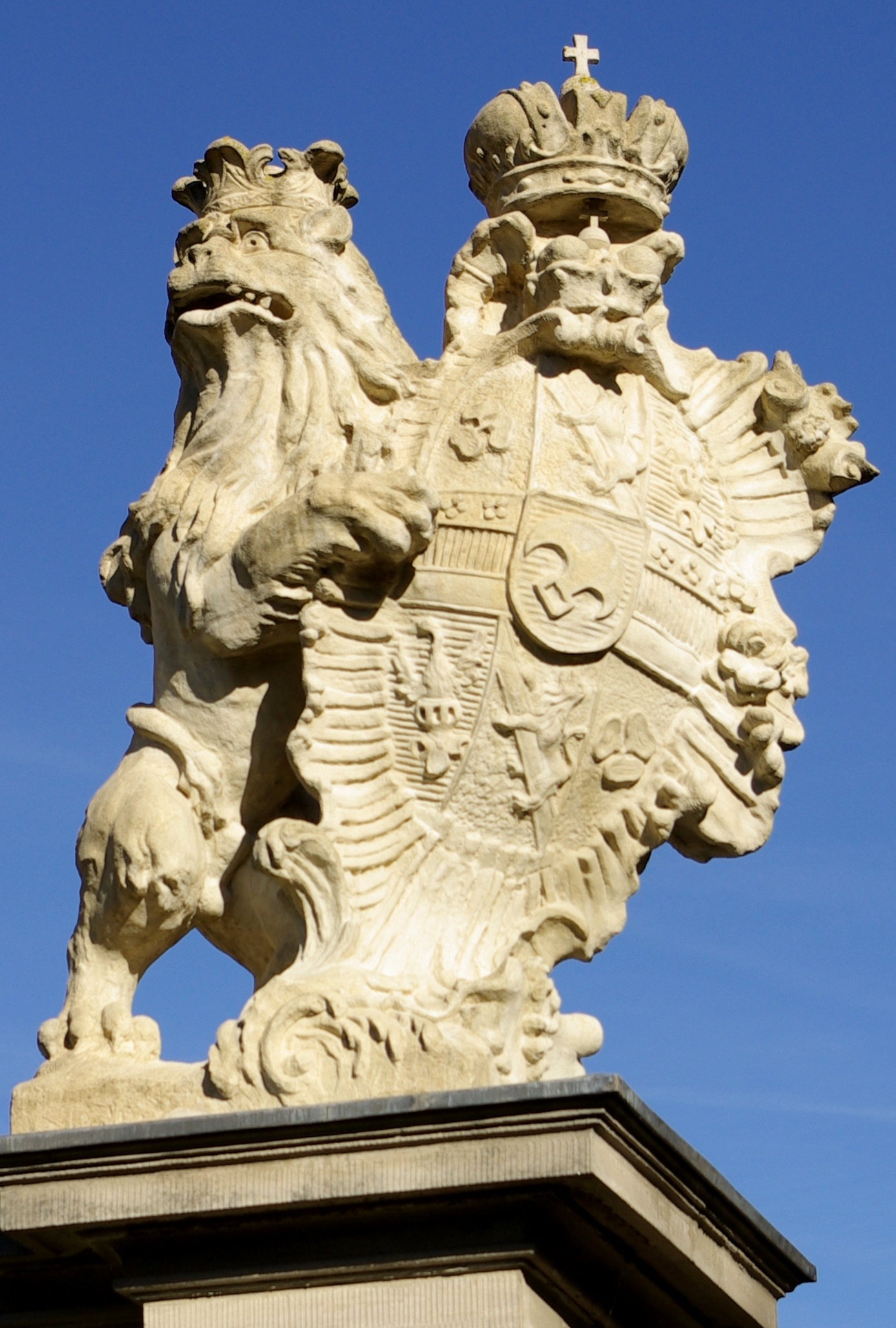 Schloss Ullstadt, linker Torpfosten